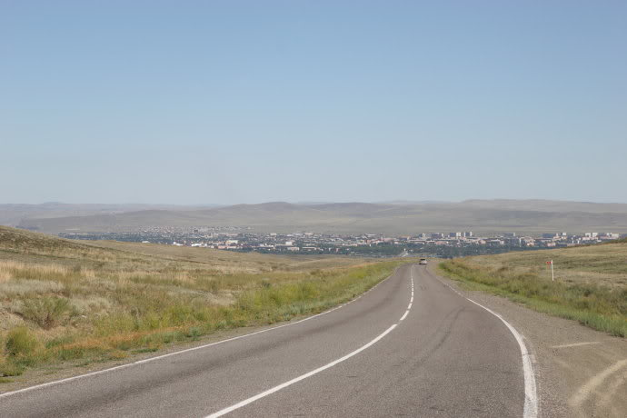 М-54 на спуске к Кызылу